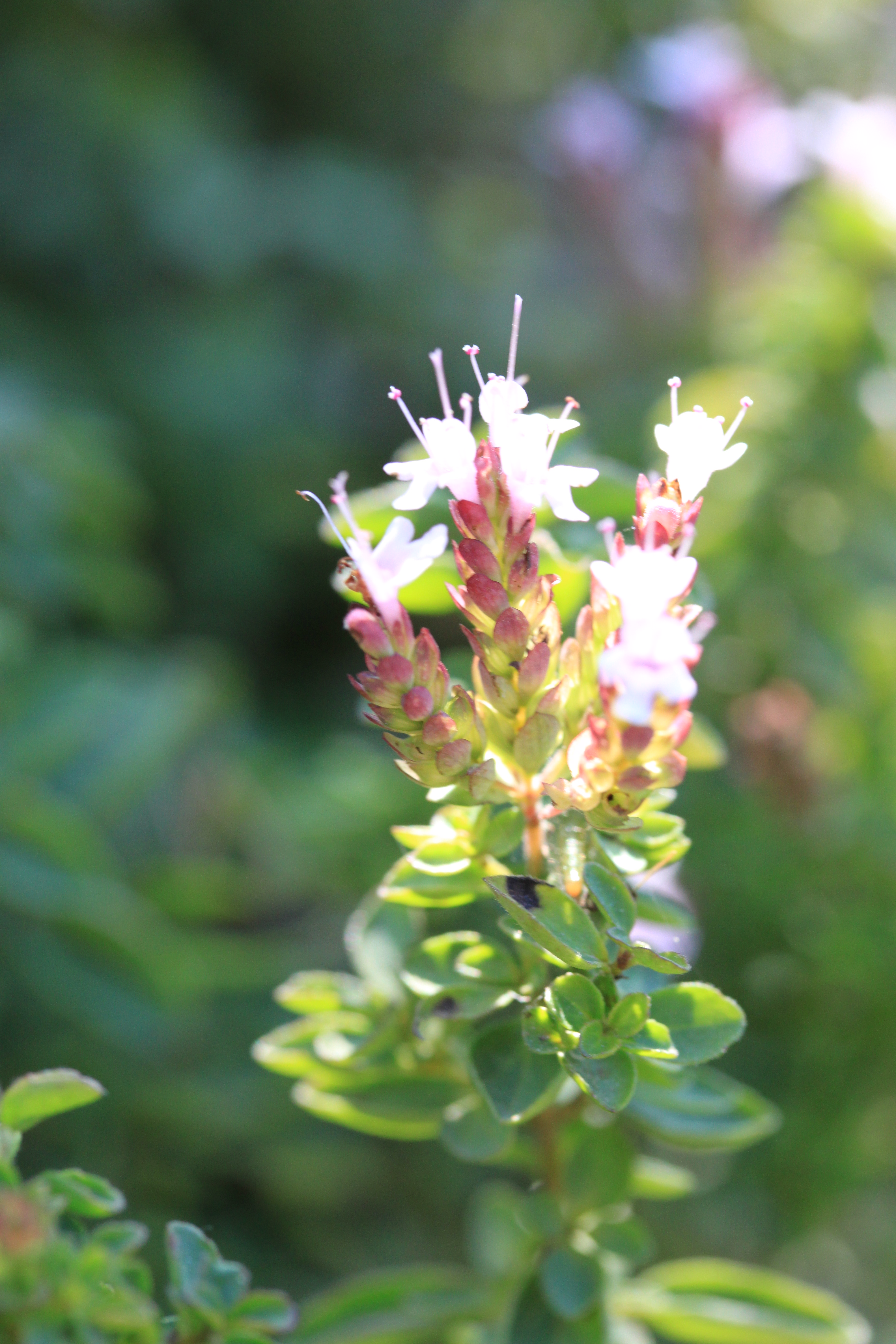 Marjolaine des jardins